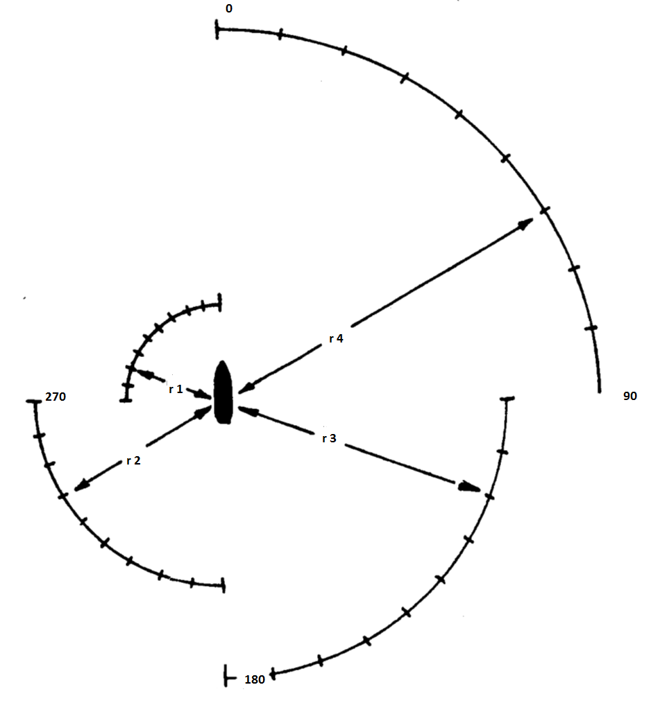 Skizze eines Splittergarten